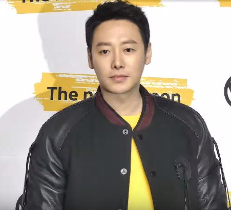 6일 오후 서울시 강남구 신사동 '폭스바겐 아트 & 라이프 스타일 하우스'에서 디 아테온(The Art:eon) 런칭 행사가 열렸다. 이날 이동욱, 김동욱, 빅스 엔(차학연), 강기영이 참석해 포토타임에서 포즈를 취하고 있다.